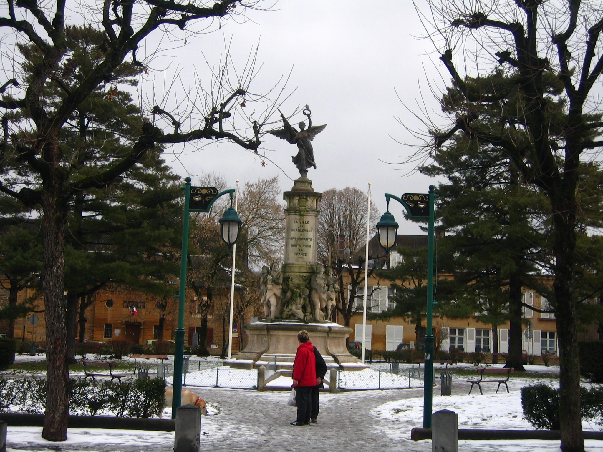 Place Churchil Charleville-Mézières